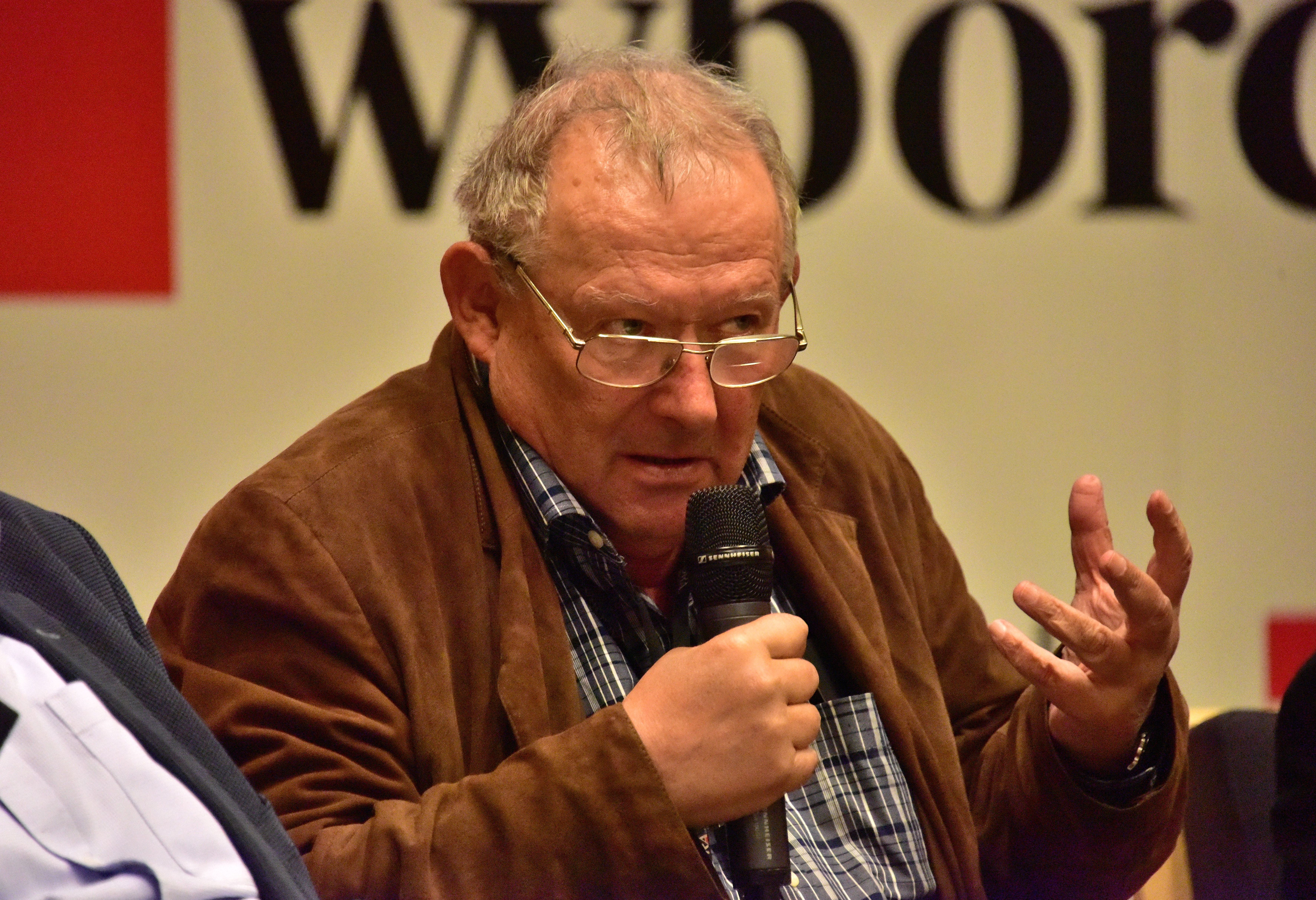 Adam Michnik podczas debaty Okrągły Stół - 30 lat później w redakcji "Gazety Wyborczej" przy ul. Czerskiej 8/10 w Warszawie